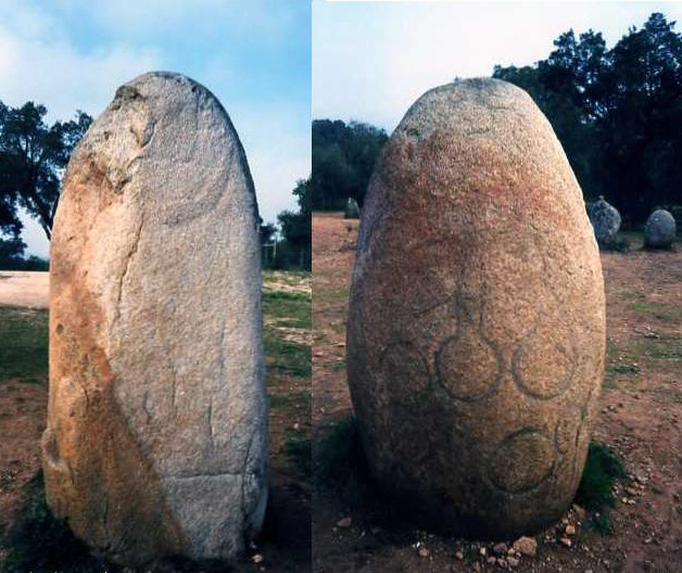 Almendres